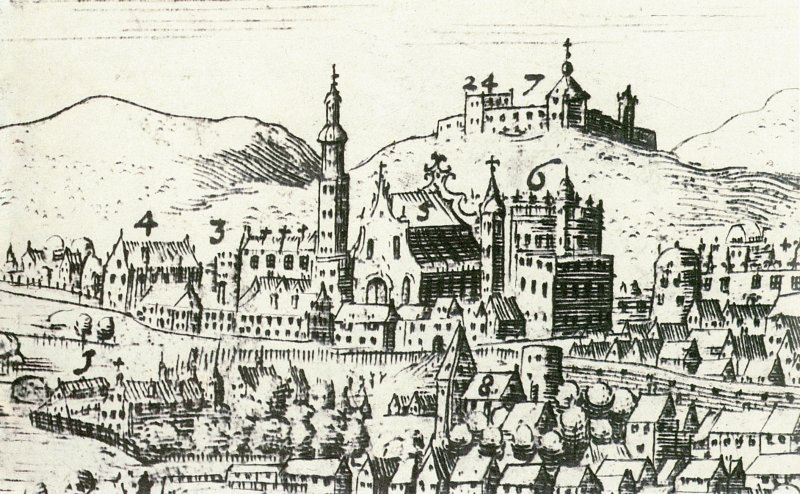 Беларуская (тарашкевіца): Віленскія замкі